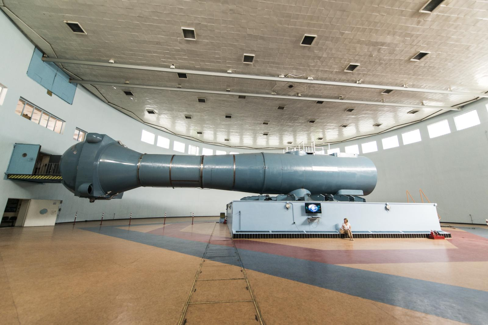 Centrifuge